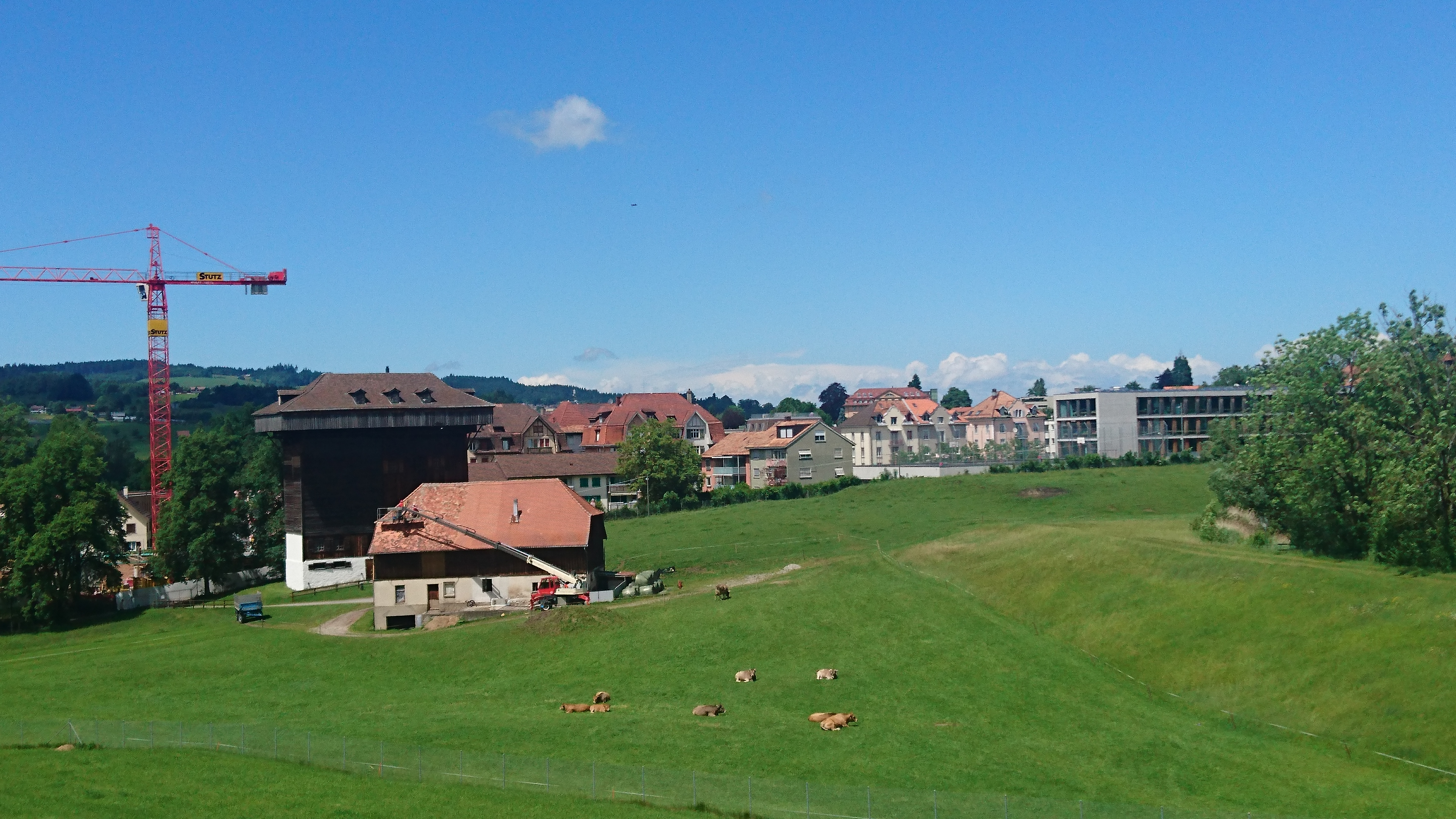 Der Antike Tröchneturm oder Tröckniturm im Lachenquartier